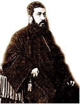 Գարեգին Սրվանձտյան